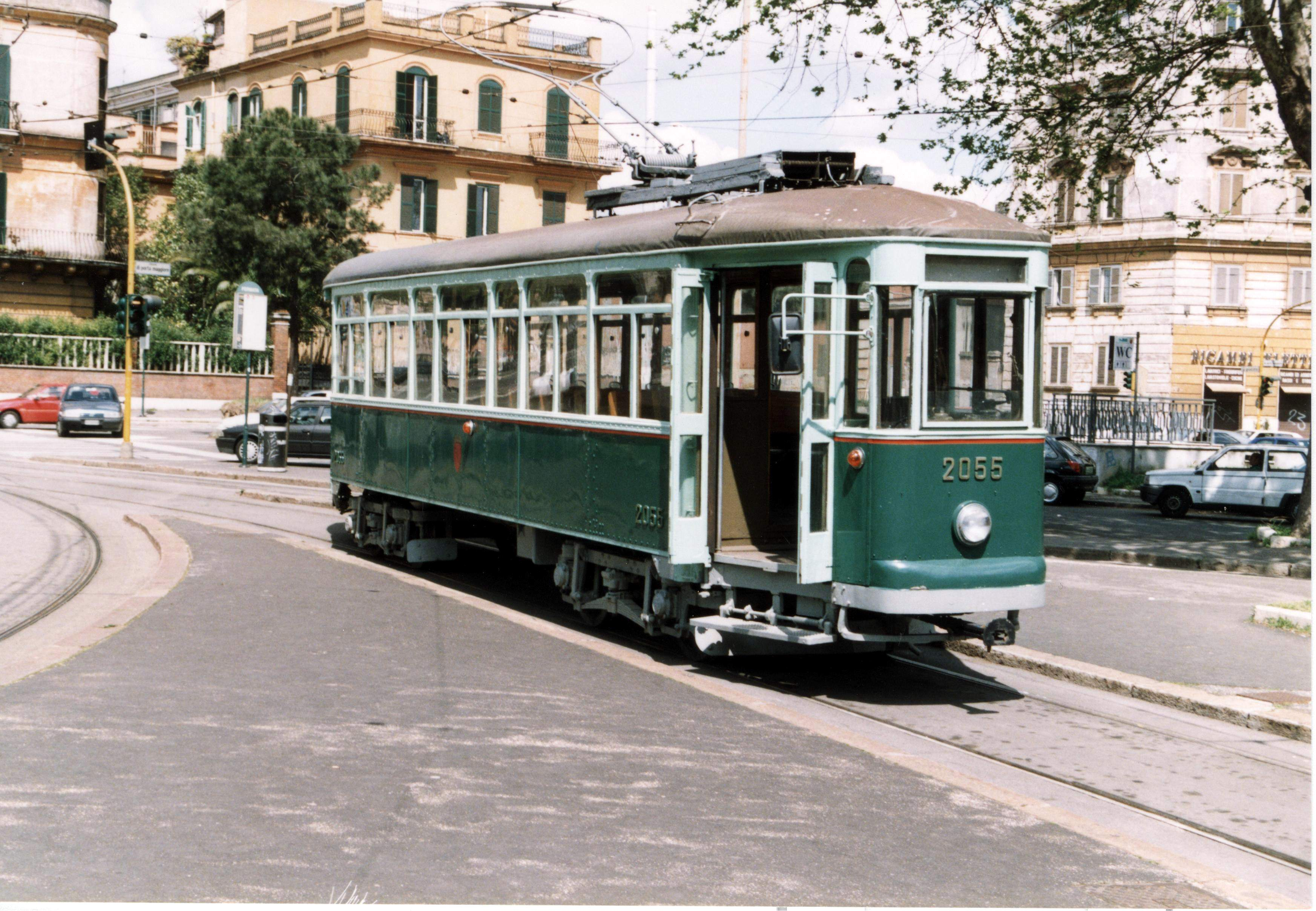 Tram MRS 2055 dell'ATAC di Roma a piazza di Porta Maggiore